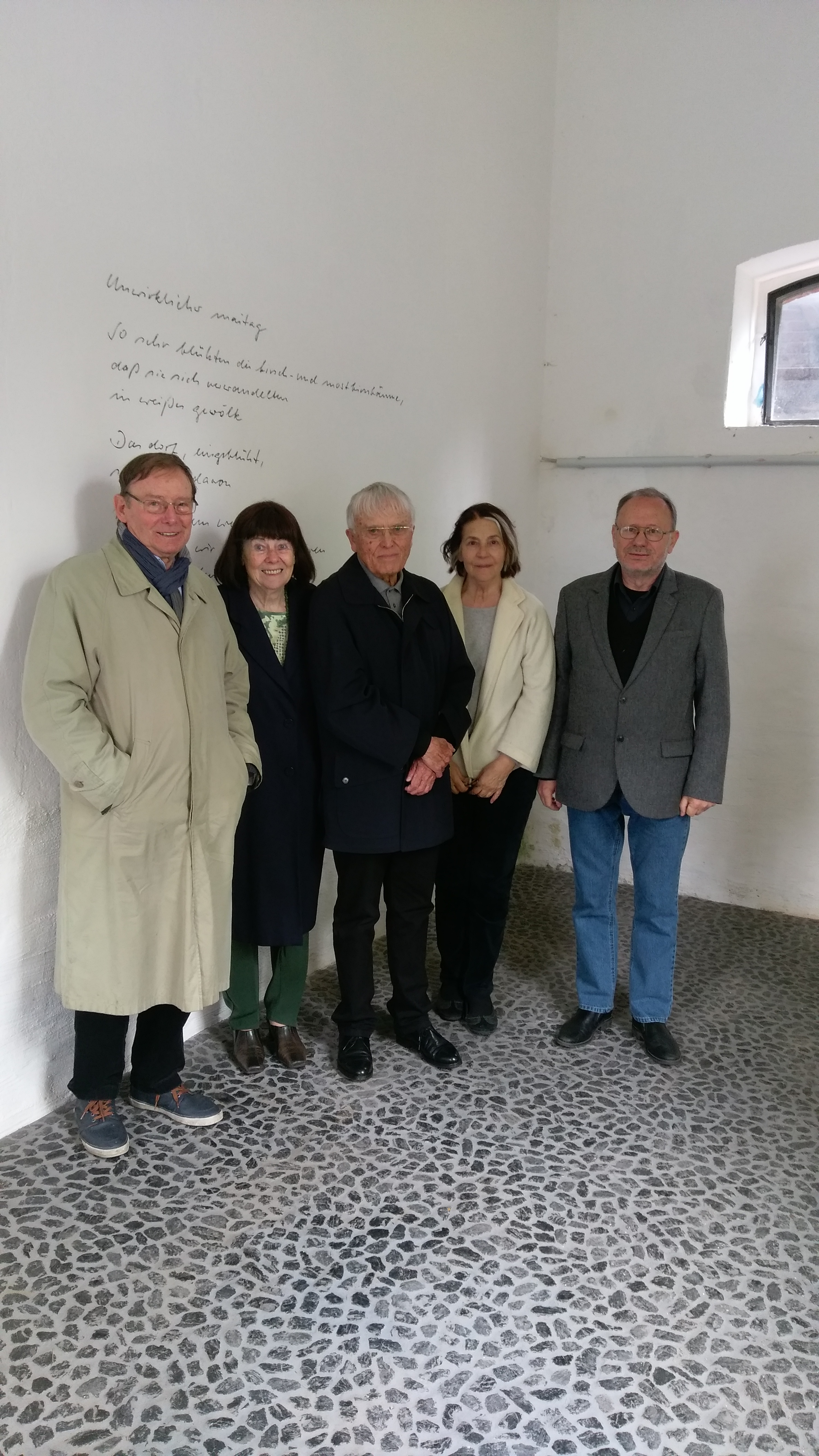 Preisträger 2017 Petro Rychlo mit Helga von Löwenich, Reiner und Elisabeth Kunze und Laudator Prof. Dr. Hans Dieter Zimmermann(v.r.n.l.) im Mai 2017 in Oelsnitz/Erzgeb., zur Besichtigung der Raumarbeit "die poesie der energie" von Frank Maibier